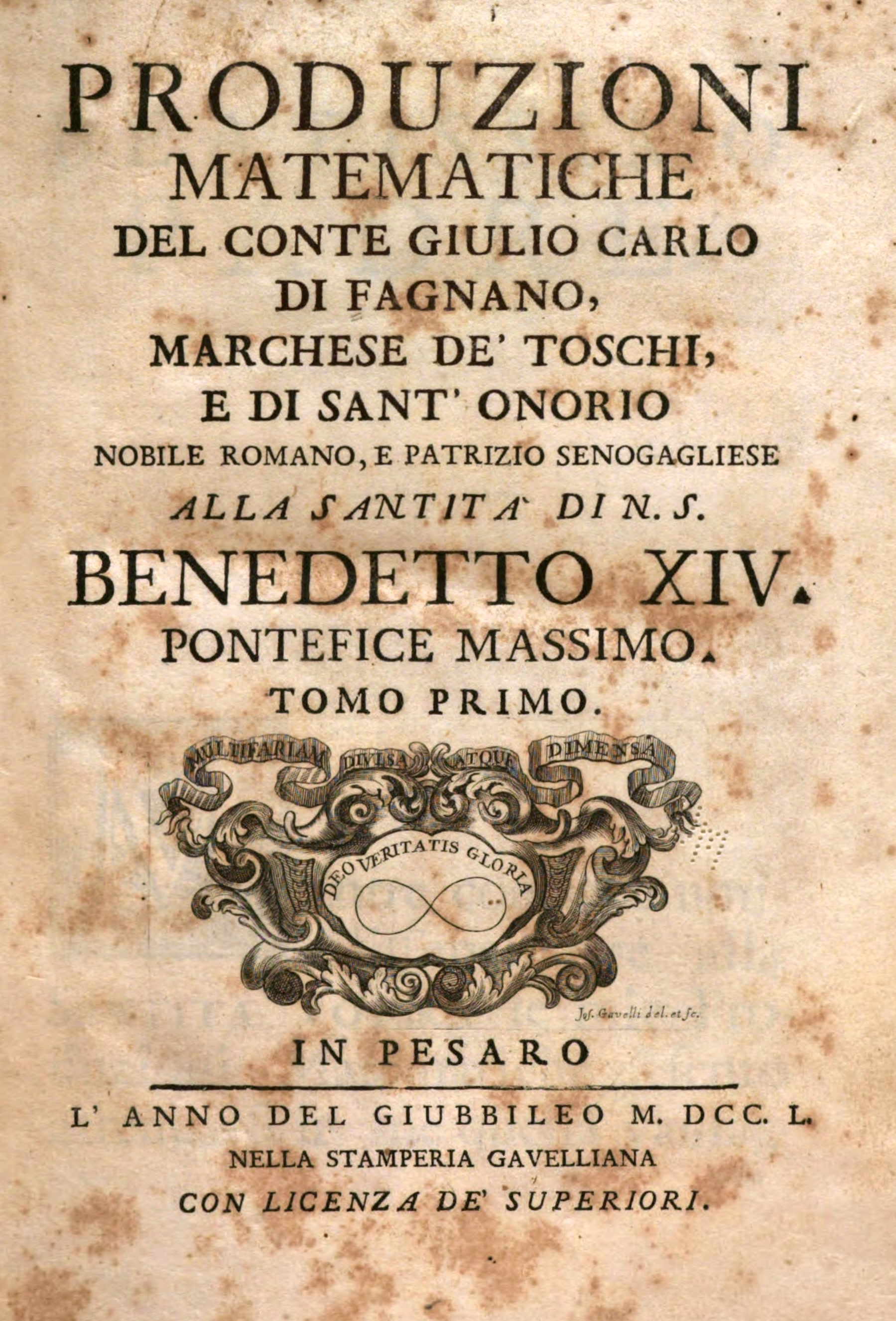 Produzioni matematiche del conte Giulio Carlo di Fagnano, marchese de' Toschi, e di Sant'Onorio nobile romano, e patrizio senogagliese alla santita' di n.s. Benedetto 14. pontefice massimo. Tomo primo [-secondo]. 1. - In Pesaro : nella stamperia Gavelliana, 1750. - XXIV, 528 p. .